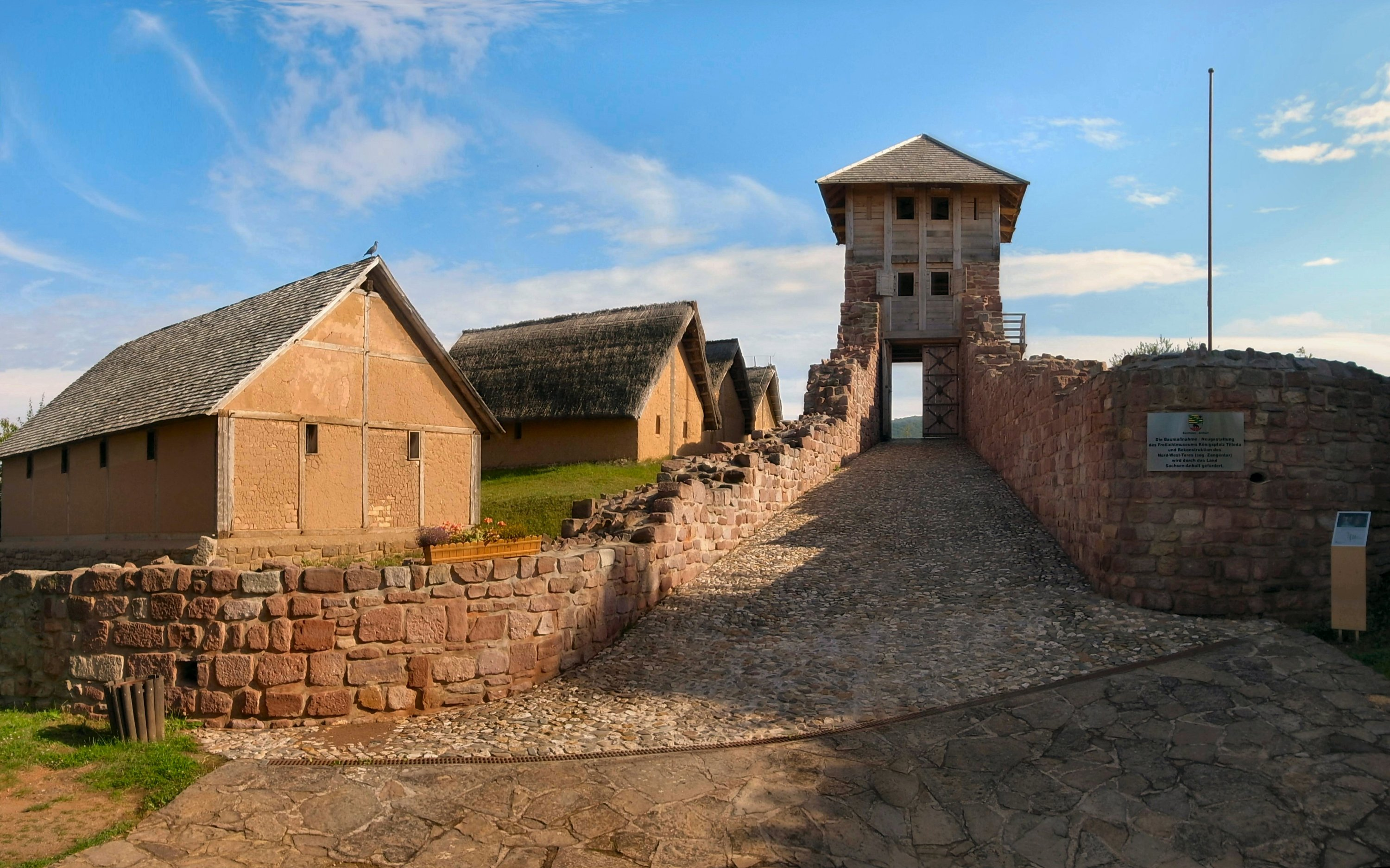 Königspfalz Tilleda,Restauriertes Zangentor